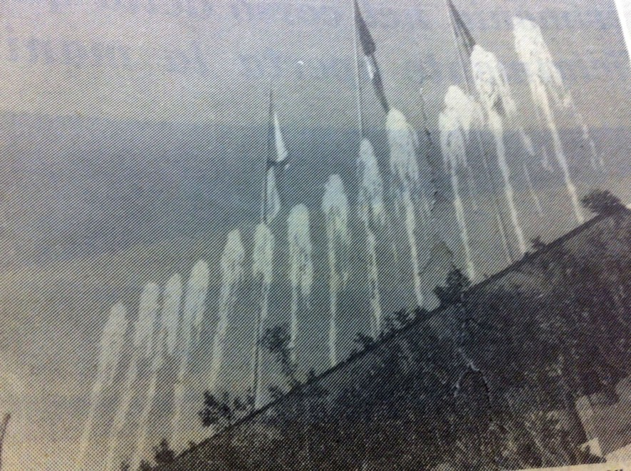 I 13 zampilli simboleggianti i Paesi partecipanti ai IV Giochi del Mediterraneo di Napoli 1963, durante la Cerimonia d'apertura, svoltasi il 21 settembre 1963, presso lo Stadio San Paolo.